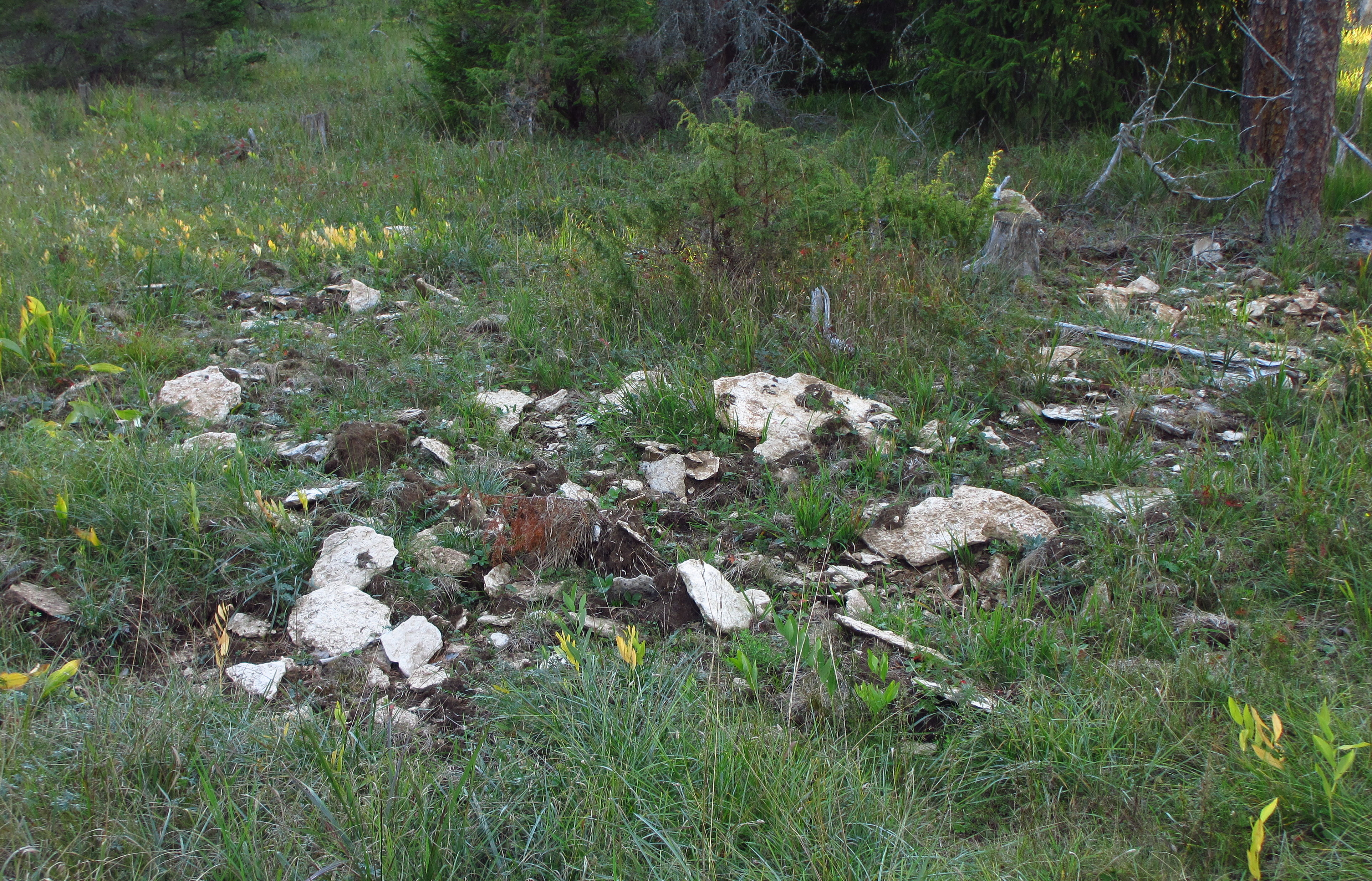 Paljanduv paas Vardi LKA